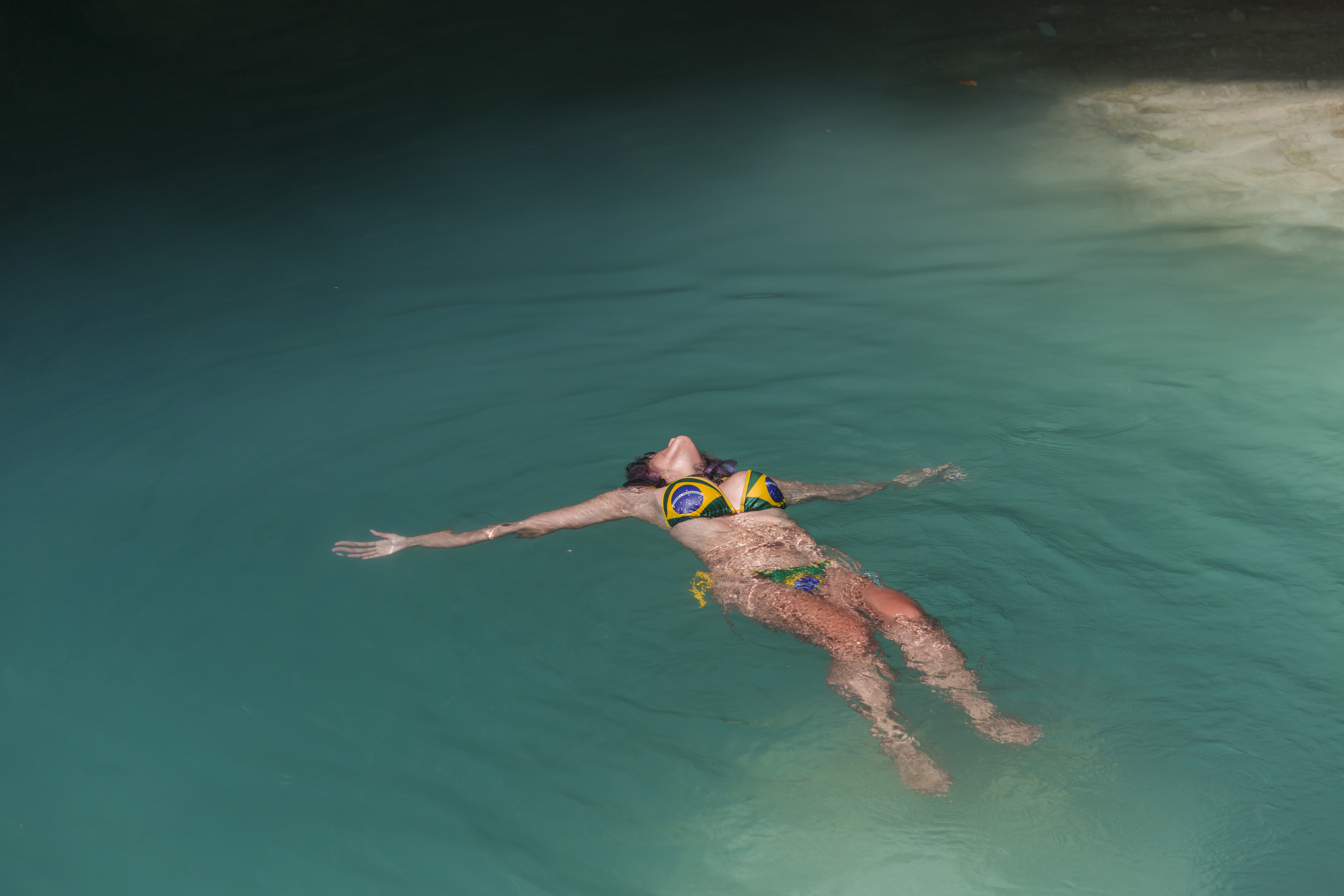 Cenote ubicado en la ruta anillo de los cenotes en el municipio de Homún.